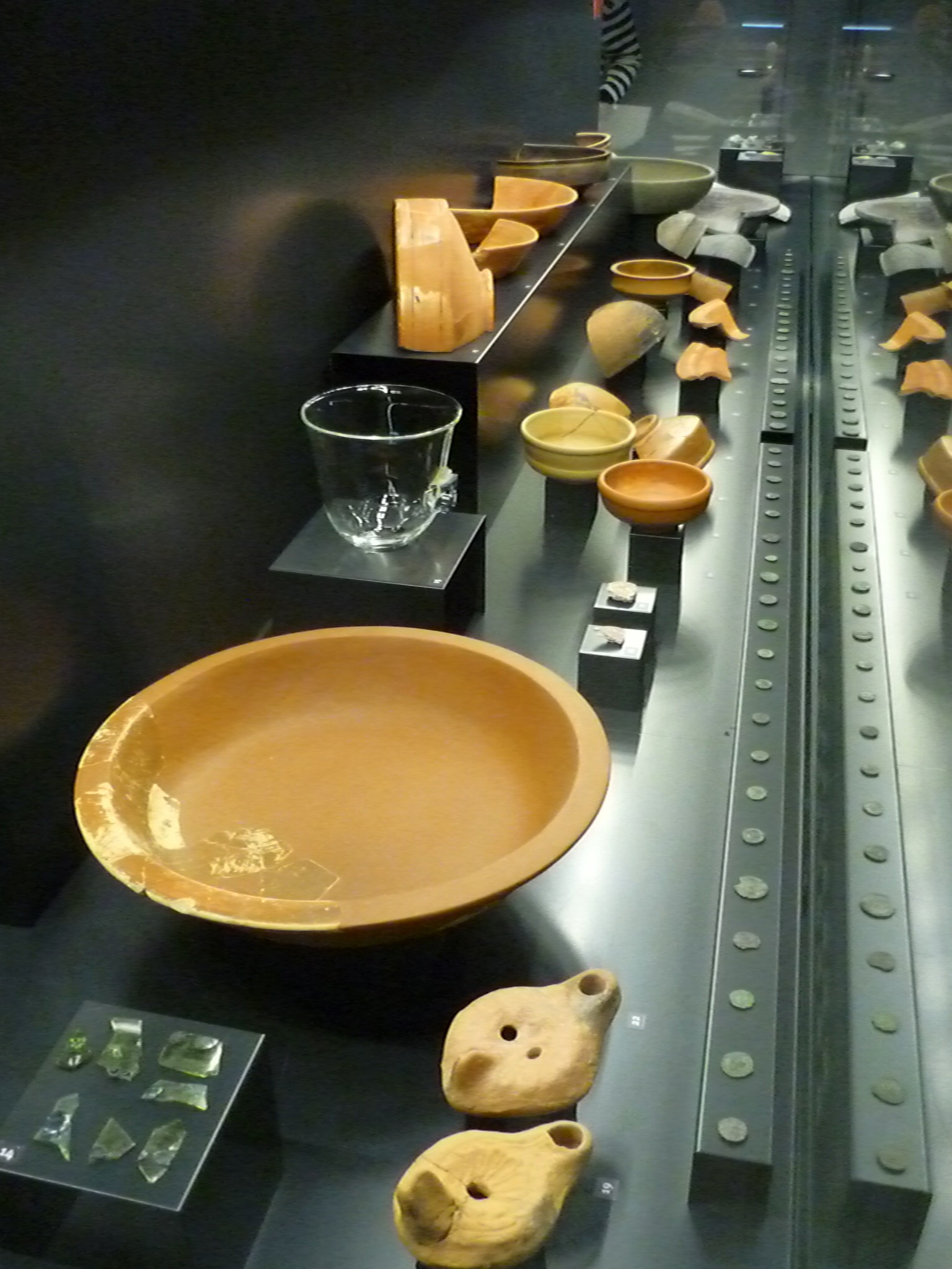 Objets trouvés lors des fouilles, musée archéologique de Grenoble, Isère, France